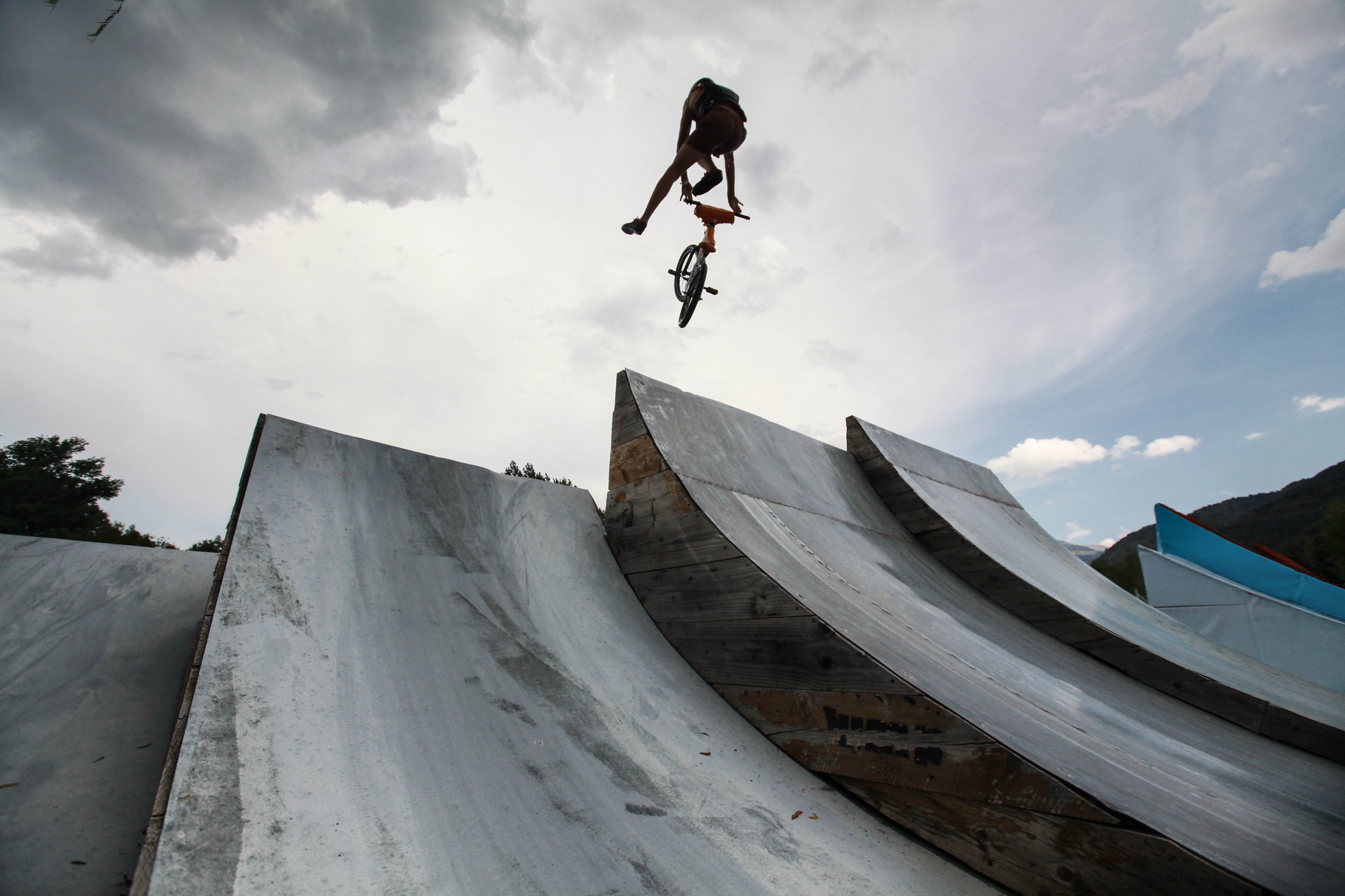 bmx